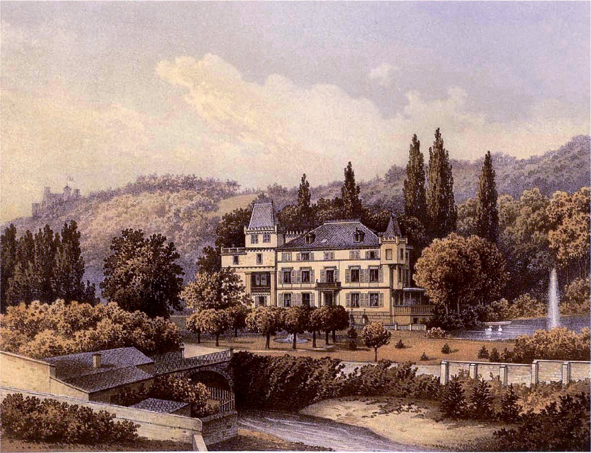 Rittergut Bangert in Bad Kreuznach. Das Anwesen wurde 1771 durch Prinzessin Henriette Amalie von Anhalt-Dessau (1720–1793) vom Oberamtsverwalter Johann Philipp von Hartung (Hardung) erworben. Ihr Hauptwohnsitz blieb aber weiterhin das Dorf Bockenheim unmittelbar vor den Toren der freien Reichsstadt Frankfurt am Main. Luftlinie Kreuznach-Bockenheim ca. 70 km. Carl Puricelli kaufte es für seinen Sohn Heinrich Puricelli (1797–1876). Das Anwesen erhielt einen zweigeschossigen Flügelbau mit Remise, die Wohn- und Wirtschaftsgebäude beherbergte. Das Anwesen in der heutigen Form wird auch als Puricelli-Schloss/Villa bezeichnet.